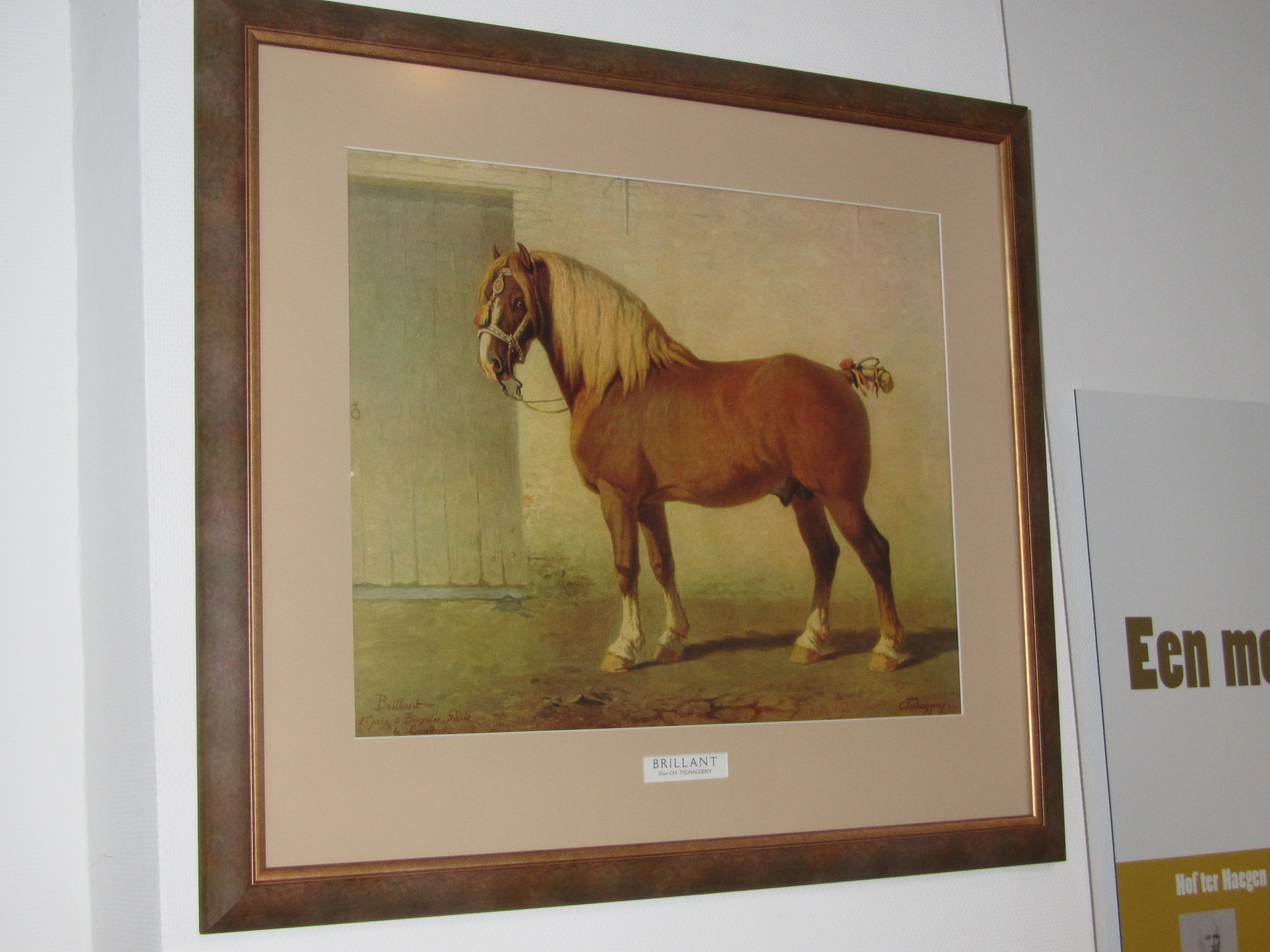 Schilderij van het Belgisch trekpaard Brillant (1868-1893) in het Museum van het Belgisch Trekpaard 2014